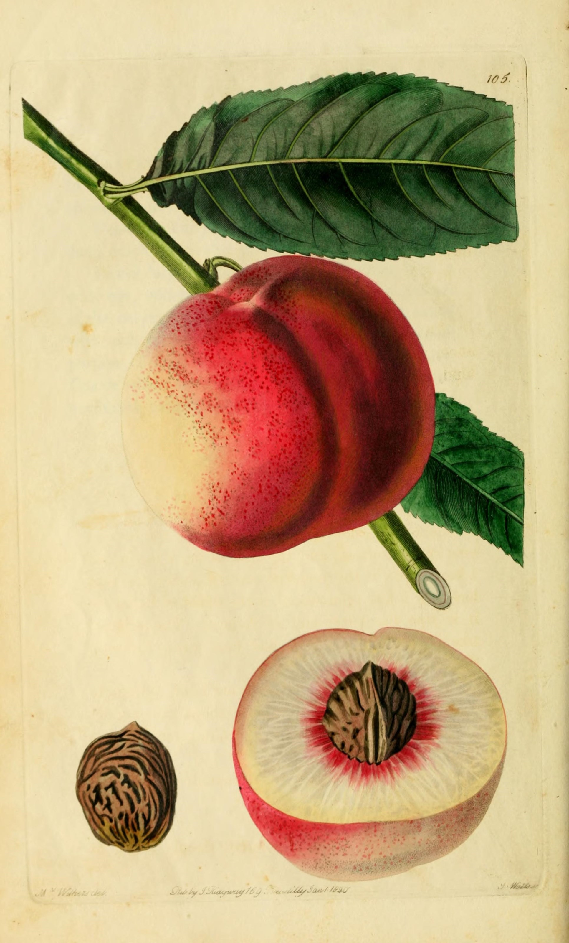 i/i^/y J'^^Miywa^/i^y ■ *- "f^